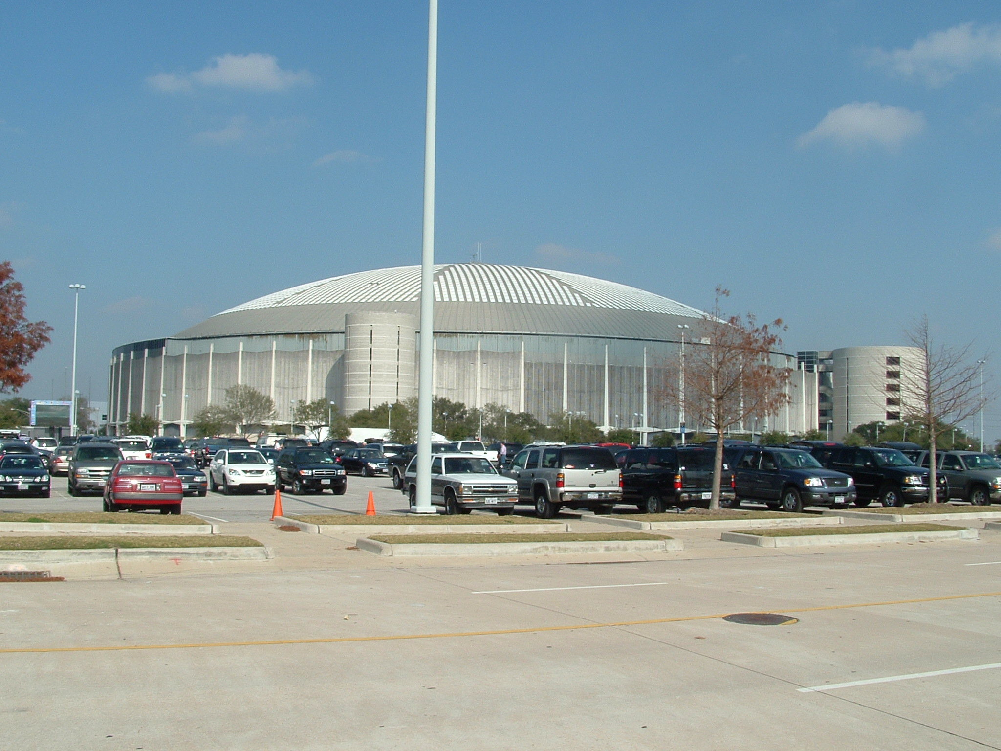 Reliant Astrodome, taken Dec. 31, 2005.